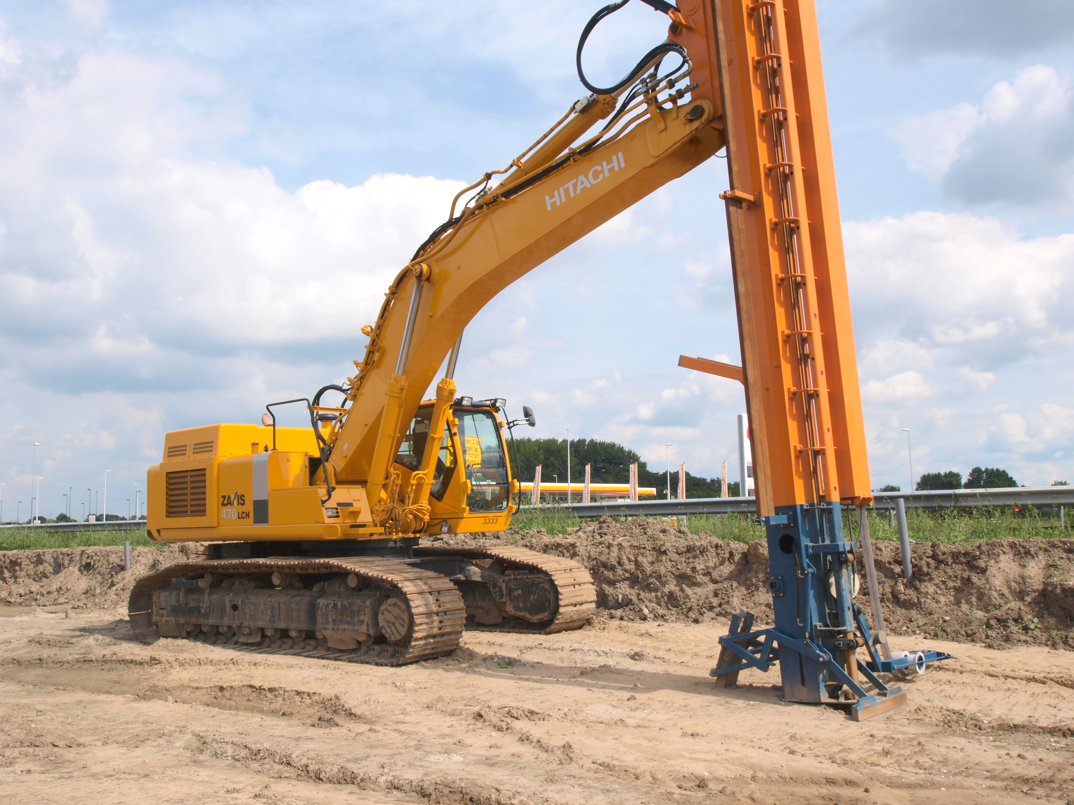 Hitachi Zaxis 470LCH